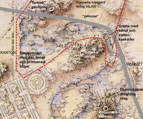 Planerad utökning av engelska parken vid Drottningholm med nutida förklaringar enligt Lovöbloggen